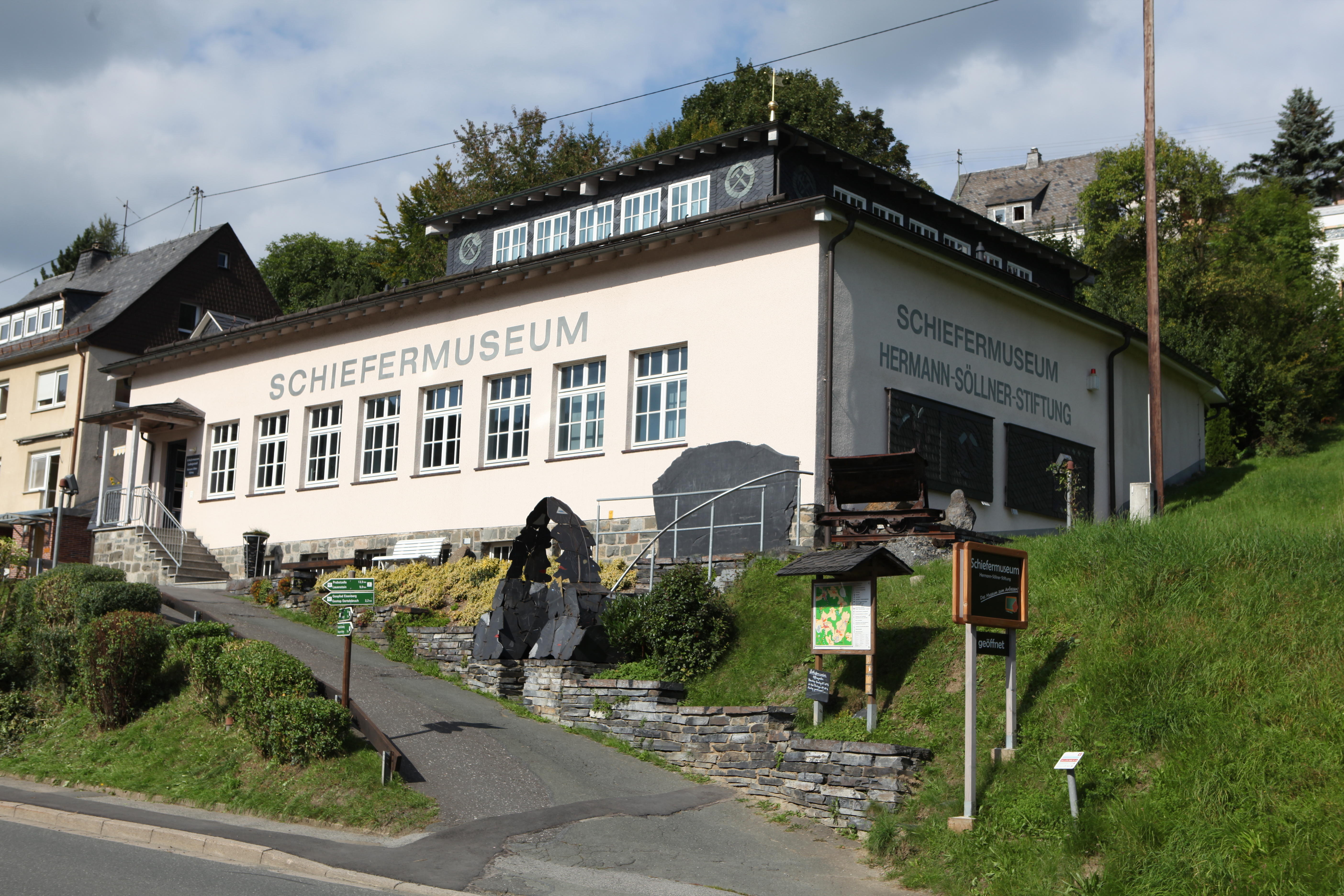 Schiefermuseum in Ludwigsstadt, Landkreis Kronach